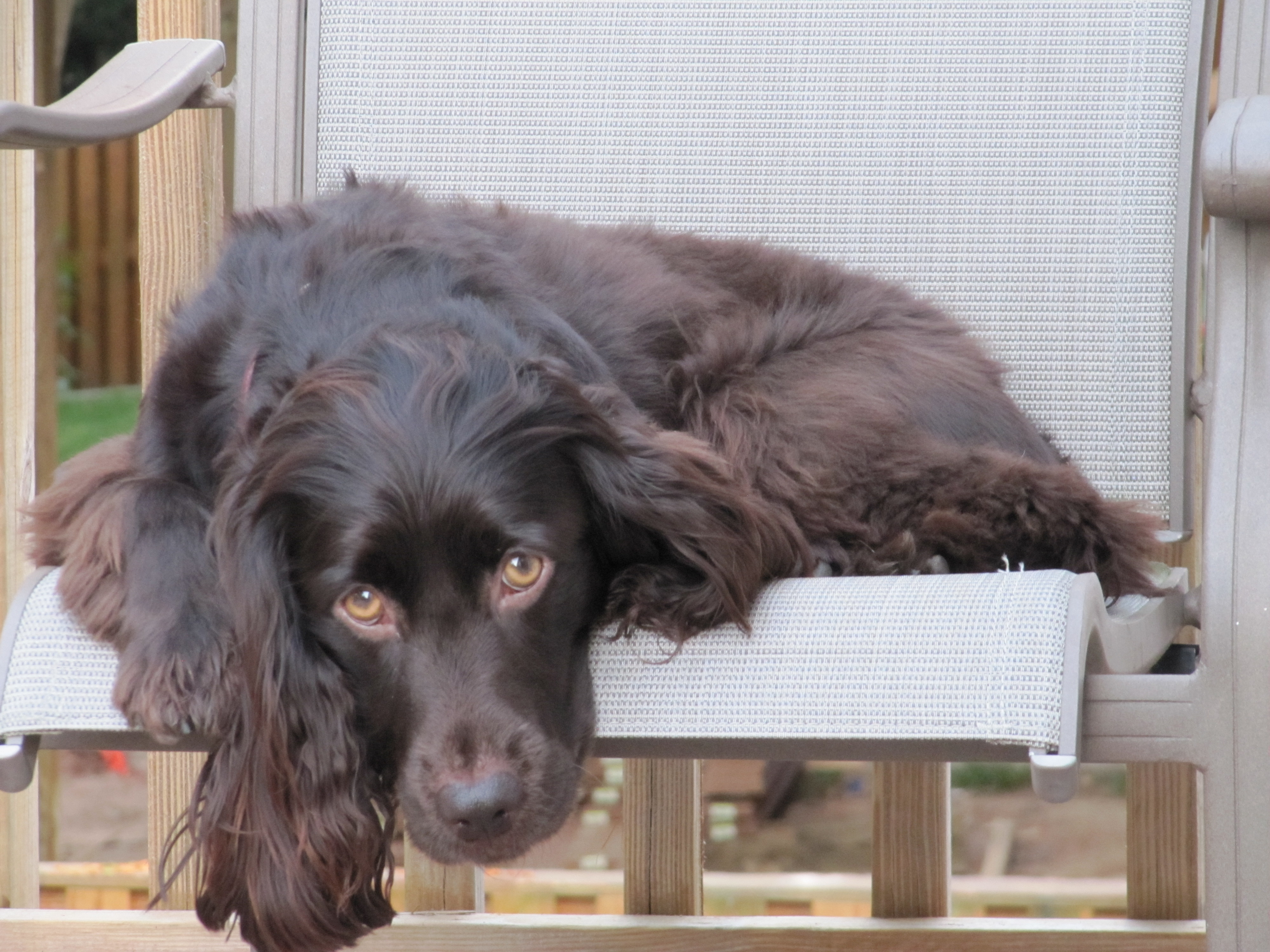 Boykin Spaniel